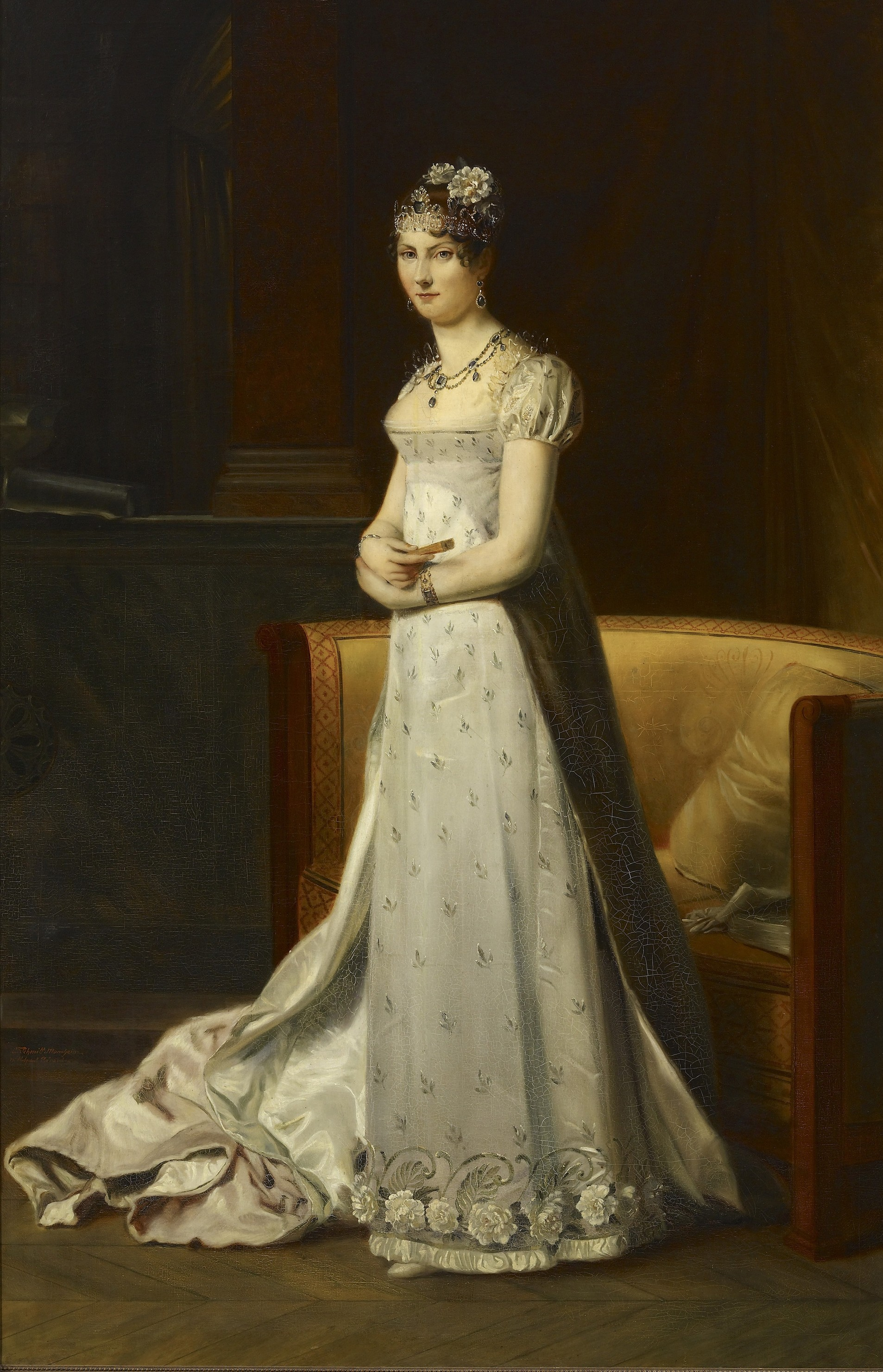 Portrait of Stéphanie de Beauharnais (1789-1860)